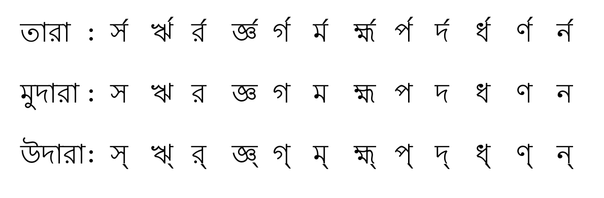 আকারমাত্রিক স্বরলিপি পদ্ধতিতে তিন সপ্তকের স্বরসমূহ